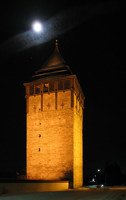 Brunflo Kastal, Östersund, Sweden